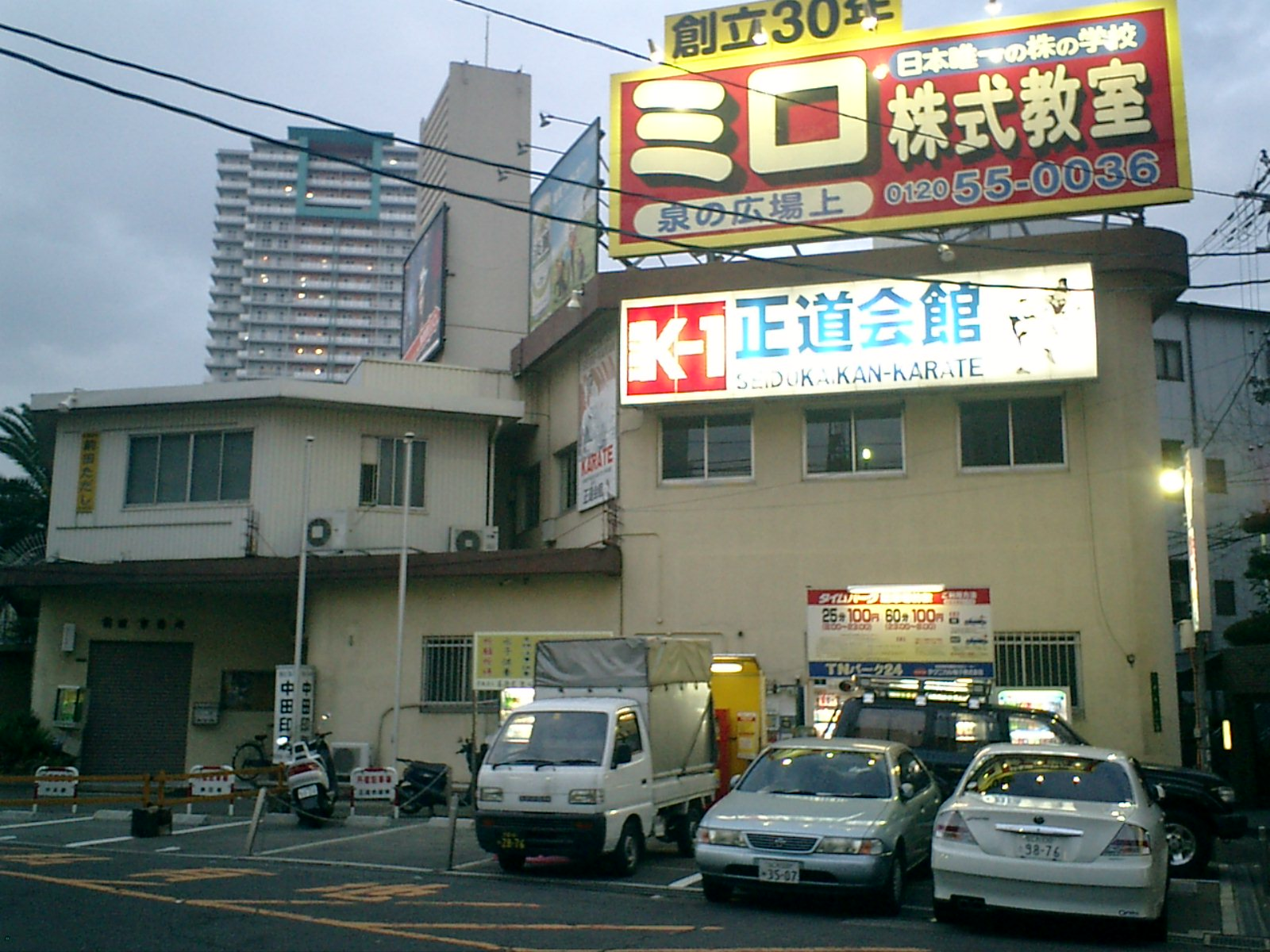 K-1の総本山・正道会館総本部（大阪市天満駅前 2006年8月 MASA撮影）Seido-Kaikan (Tenma at Osaka City)